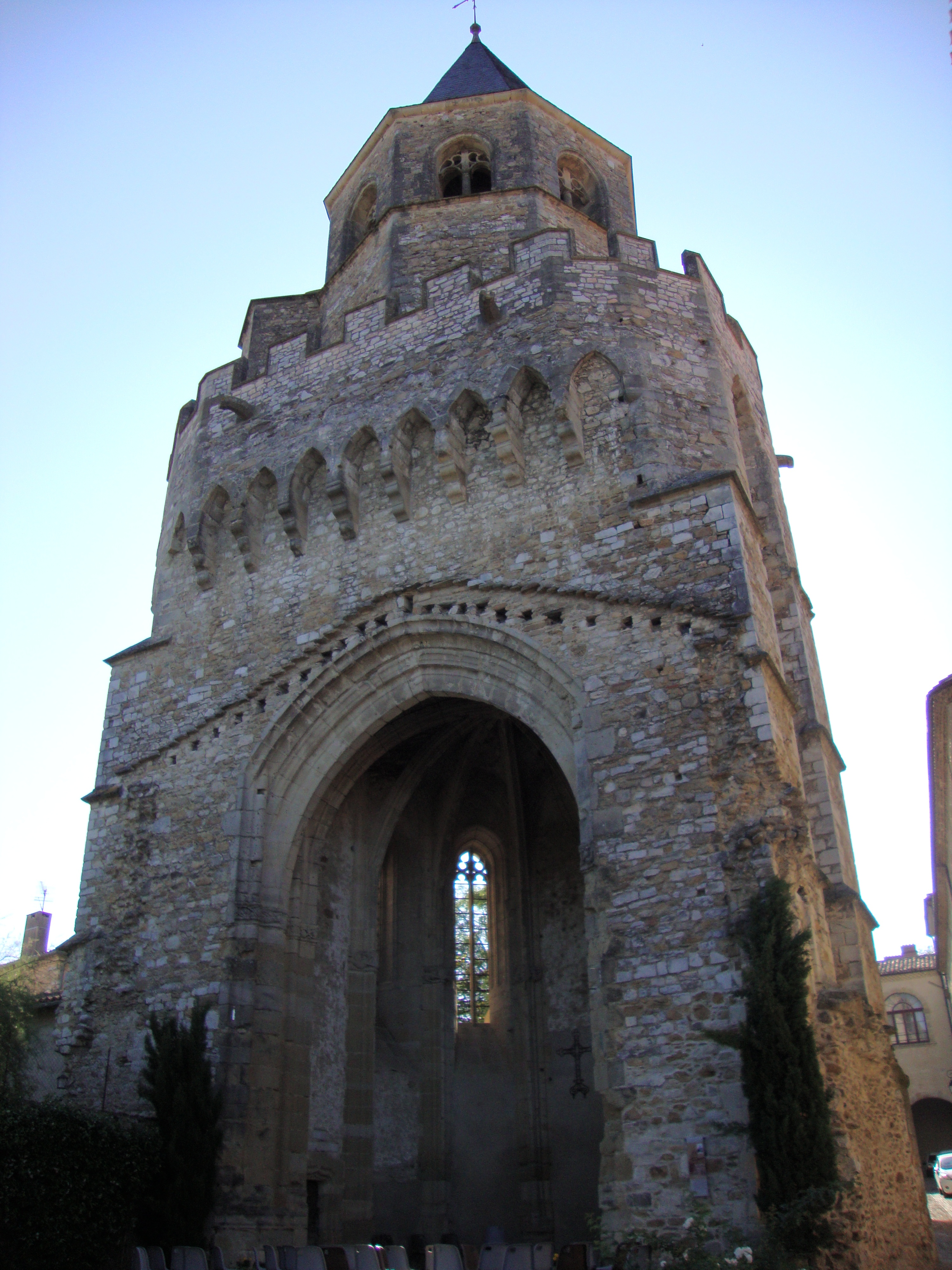 Sorèze (Tarn, Fr) Tour Saint-Martin